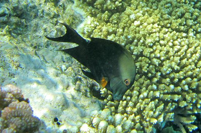 Acanthurus nigrofuscus en colonia de Acropora, Egipto